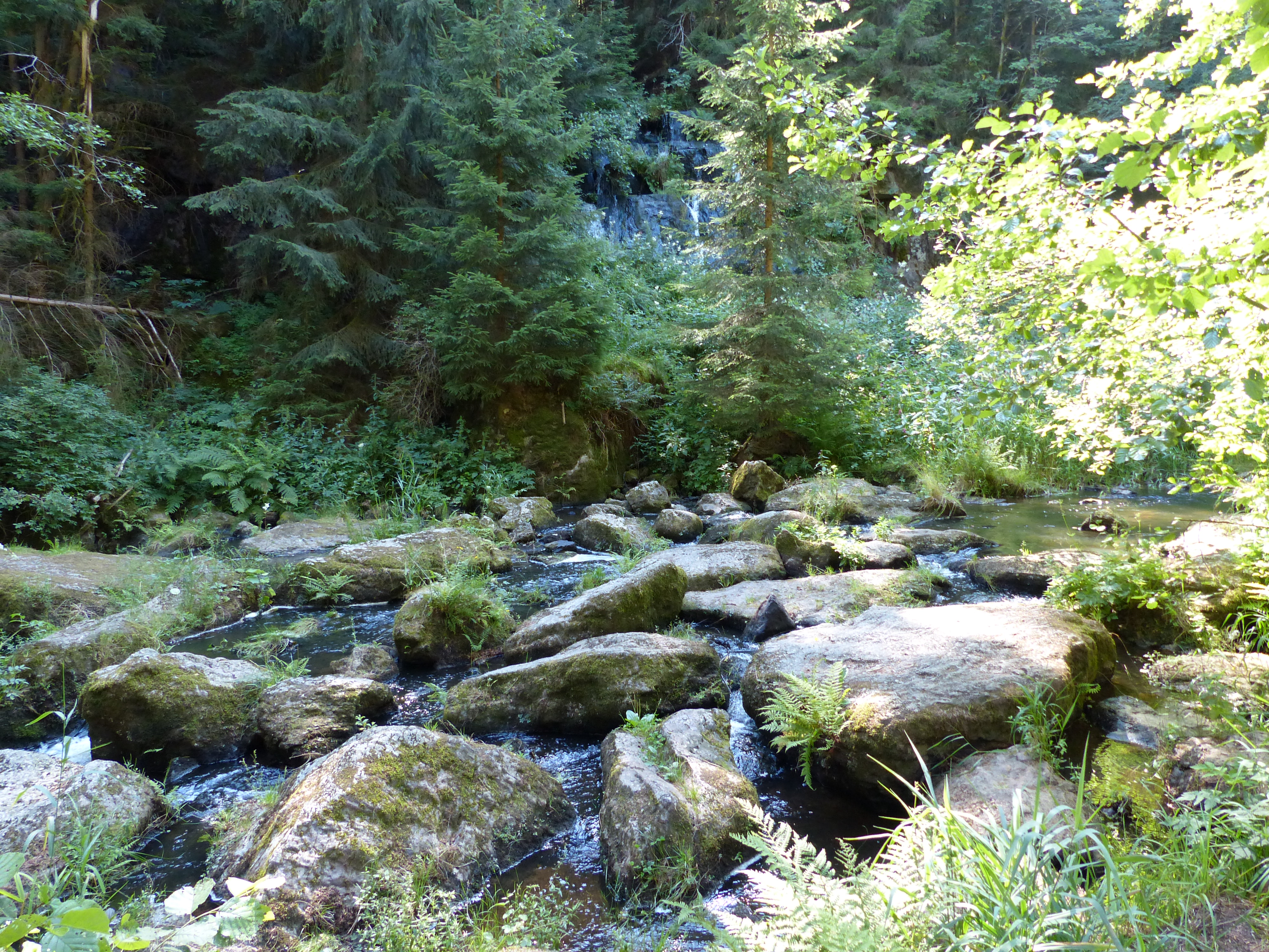 Thusmühle, Ortsteil von Röslau